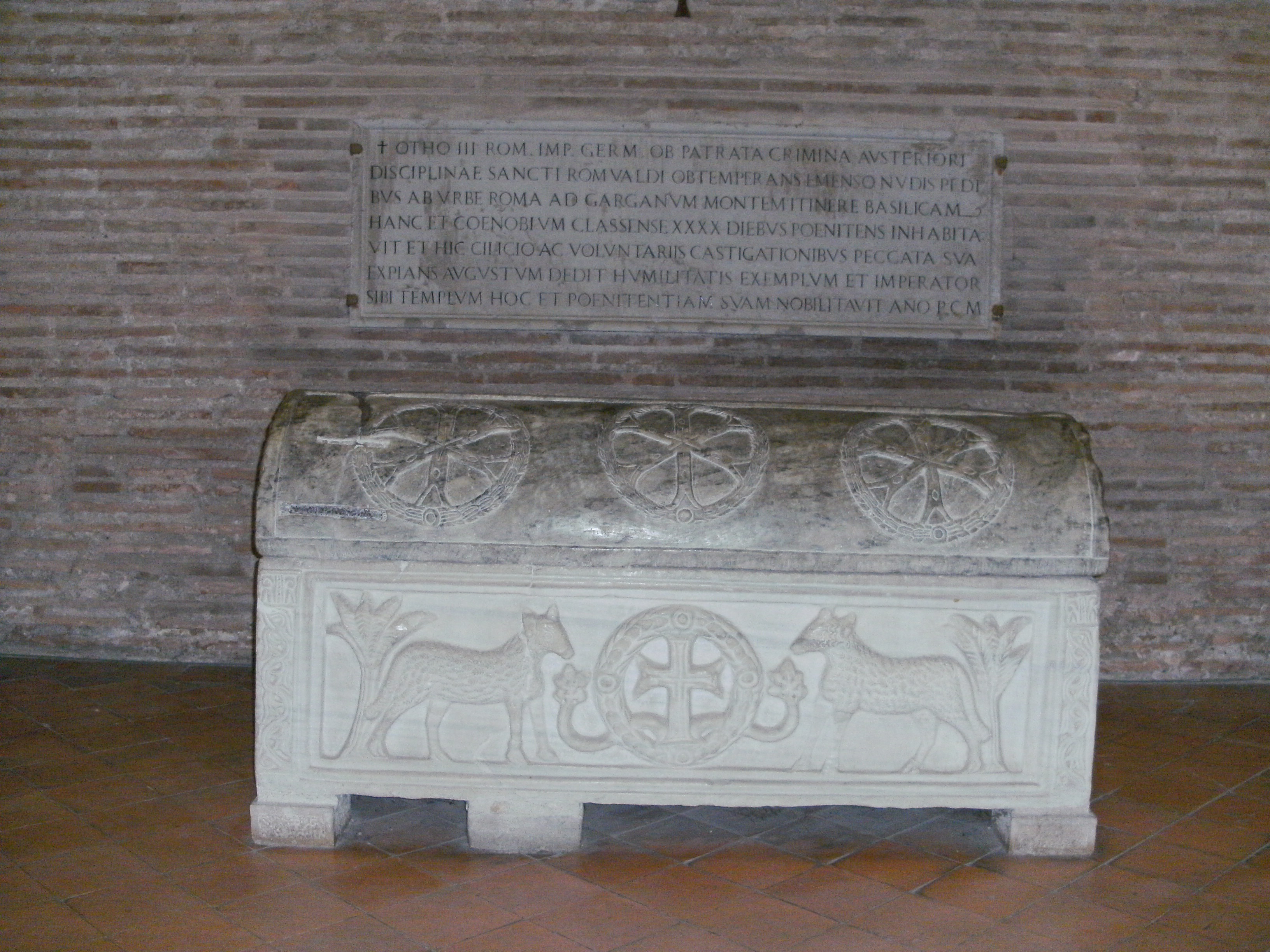 Basilika Sant'Apollinare in Classe (Italien), Gedenktafel für den deutsch-römischen Kaiser Otto III., der sich im Jahr 1001 während der Fastenzeit 40 Tage lang im Kloster von Classe aufhiel